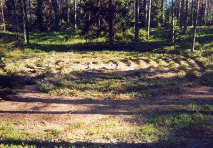 Labyrint. Fornlämning på Stora Harskär, Ångermanland